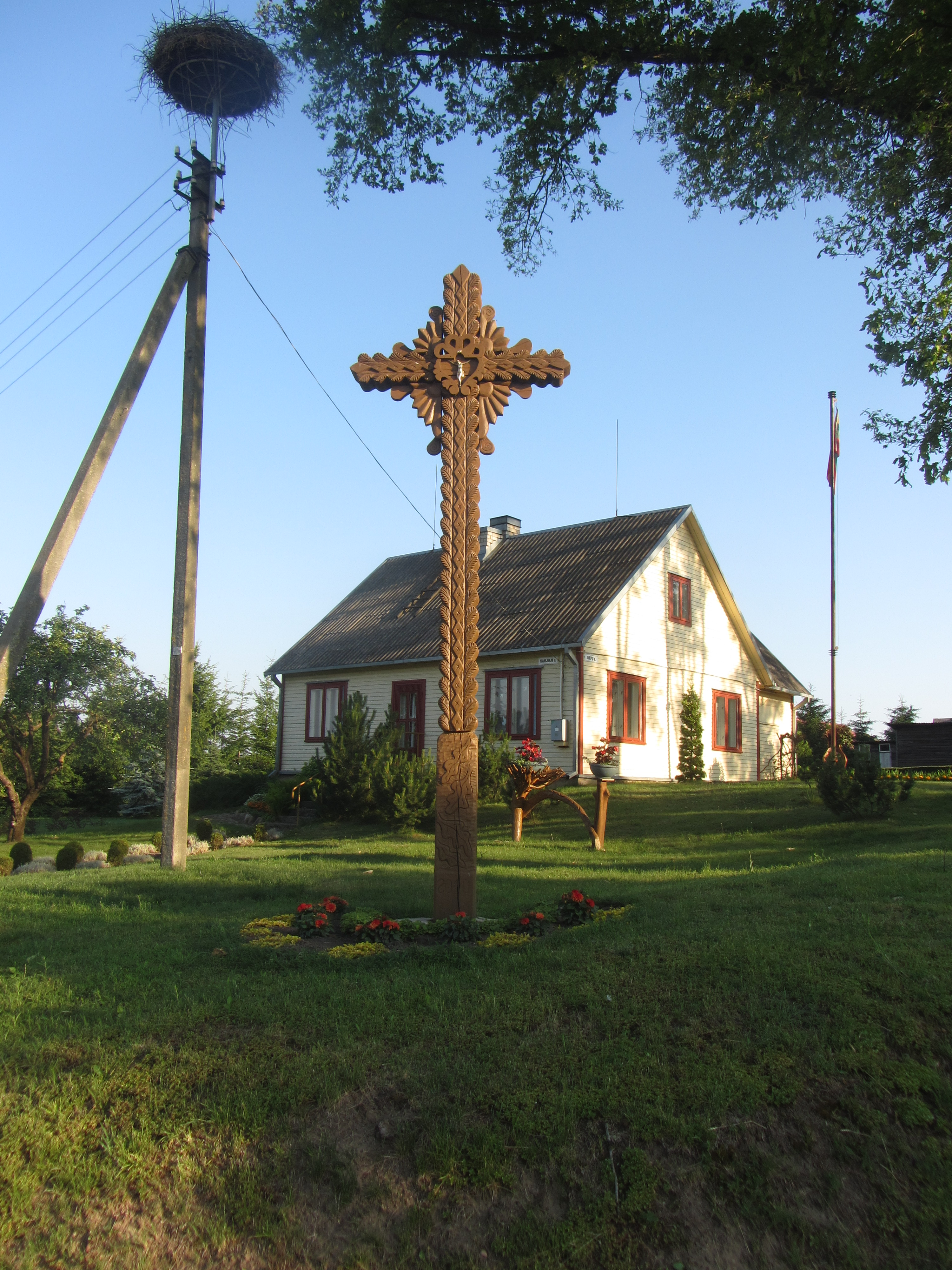 Noragėliai, Lithuania